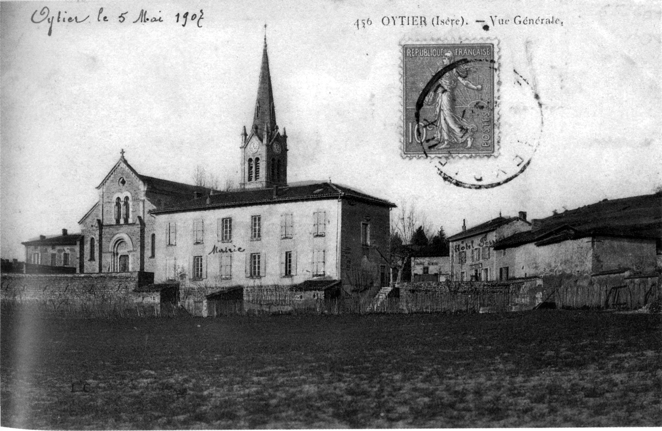 Oytier-Saint-Oblas, vue générale de Oytier en 1907